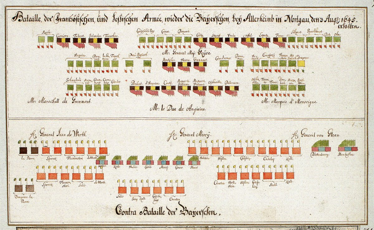 (Handzeichnung) Bataille der Französischen und Hessischen Armee wieder die Bayerischen, bey Allerheim in Nortgau, den 3. Aug. 1645